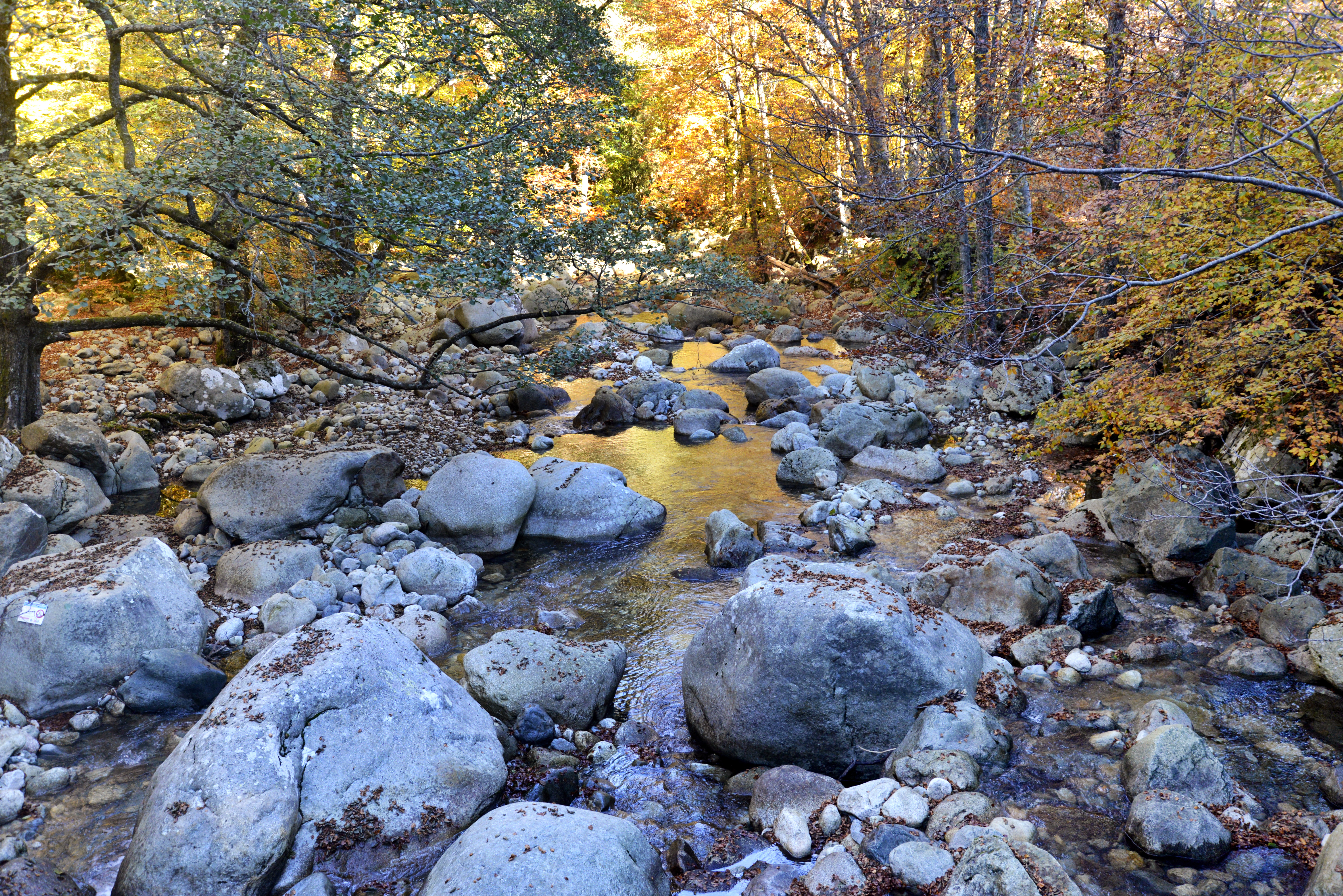 Vivario, Centre Corse (Haute-Corse) - Le Vecchio dans la forêt de Vizzavona, vu depuis le pont du sentier de découverte archéologique menant à l'Abri Southwell.